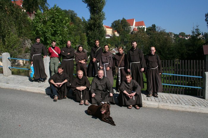 Bratři františkáni na pouti v Bechyni.